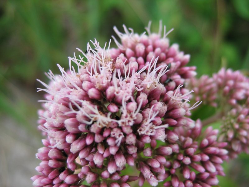 Gewöhnlicher Wasserdost Eupatorium cannabinum